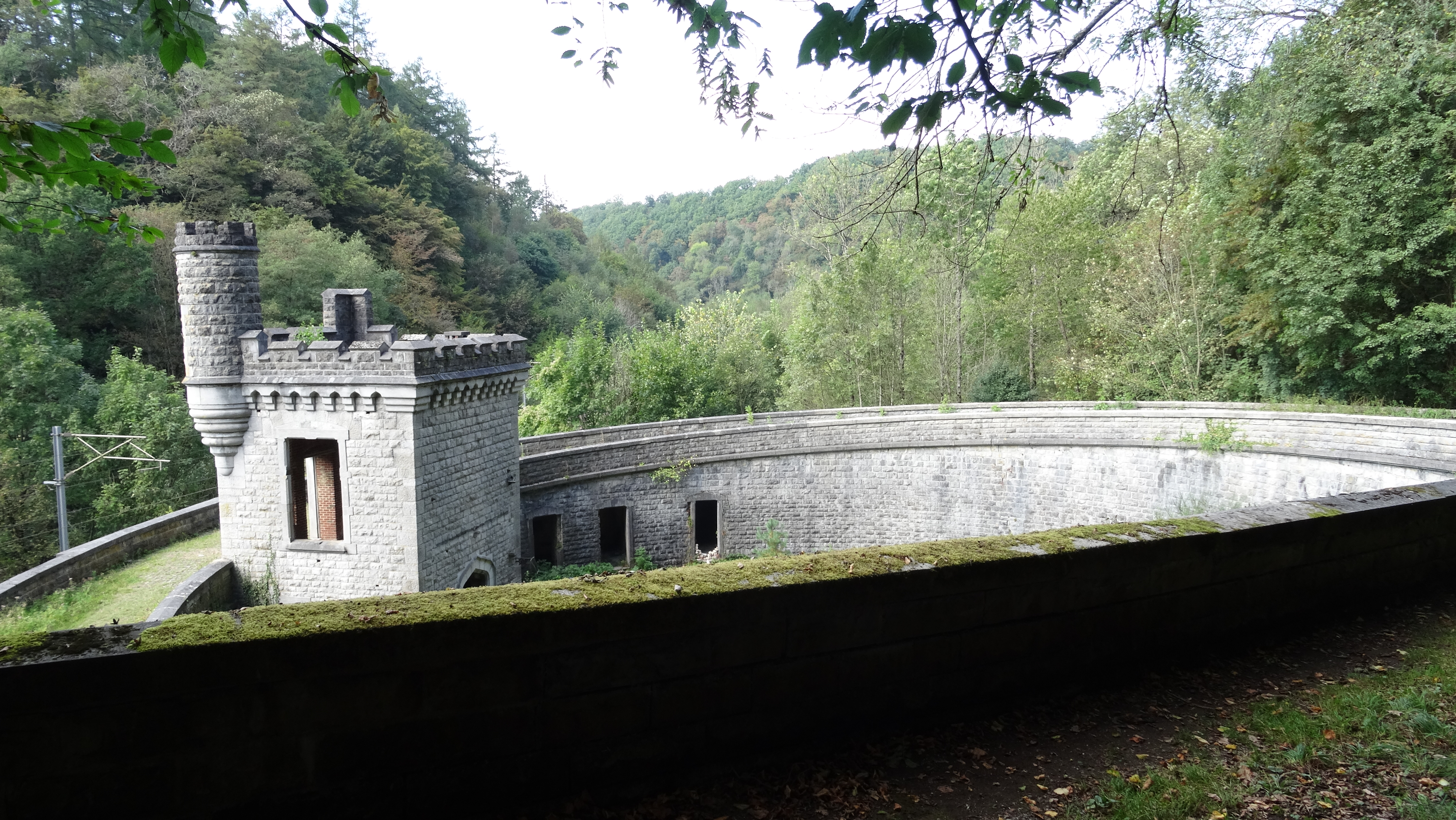 Vestiges de l'ancienne halte royale d'Ardenne. (Belgique, Région wallonne, province de Namur).